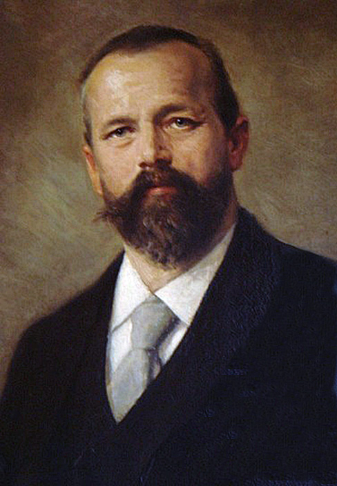 Porträt-Gemälde von Joseph Losenhausen (1851–1919), Maschinenfabrikant in Düsseldorf